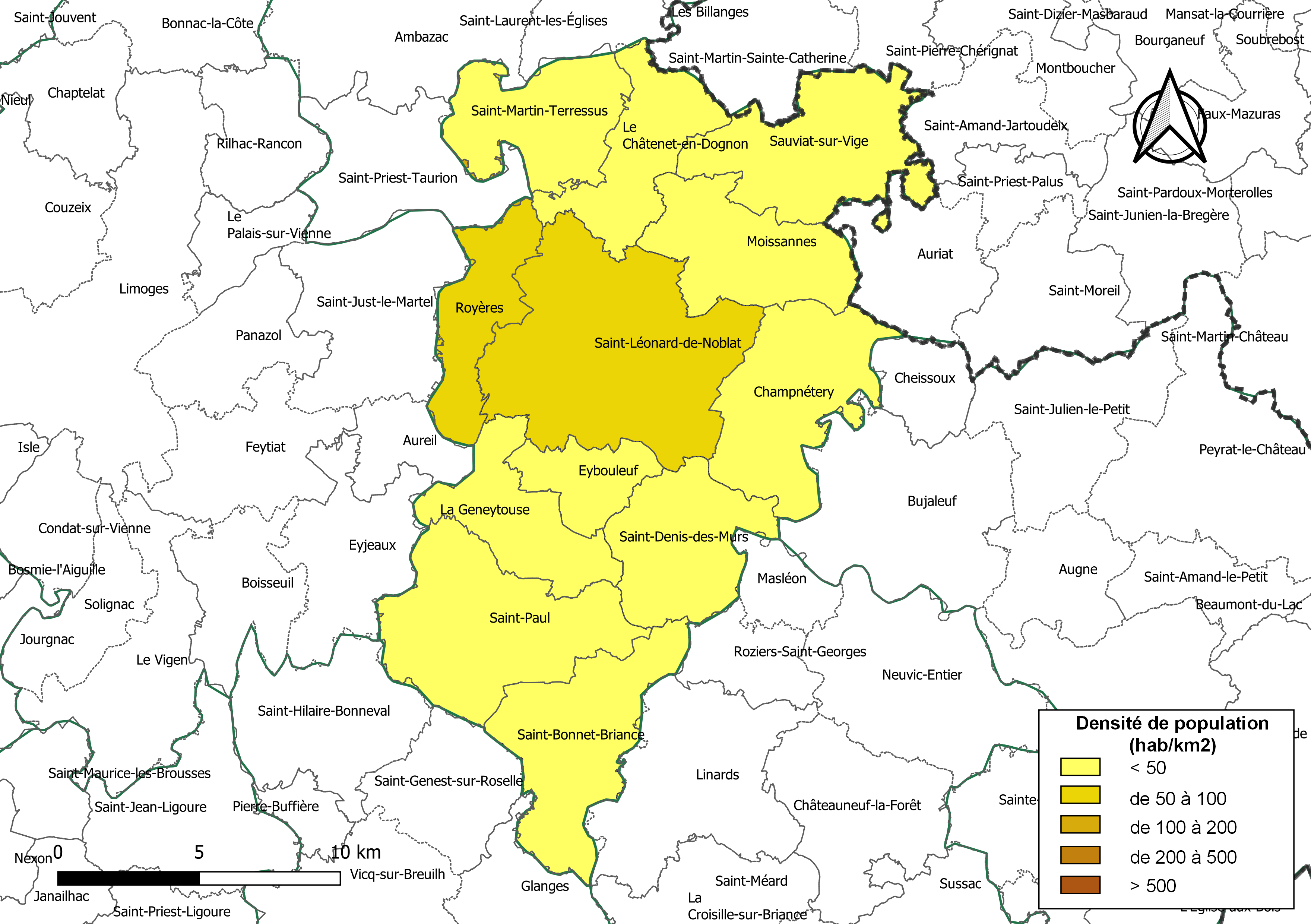 Carte des densités de population (millésimée 2016) des communes de la Communauté de communes de Noblat, département de la Haute-Vienne, France. Composition au 1er janvier 2019.